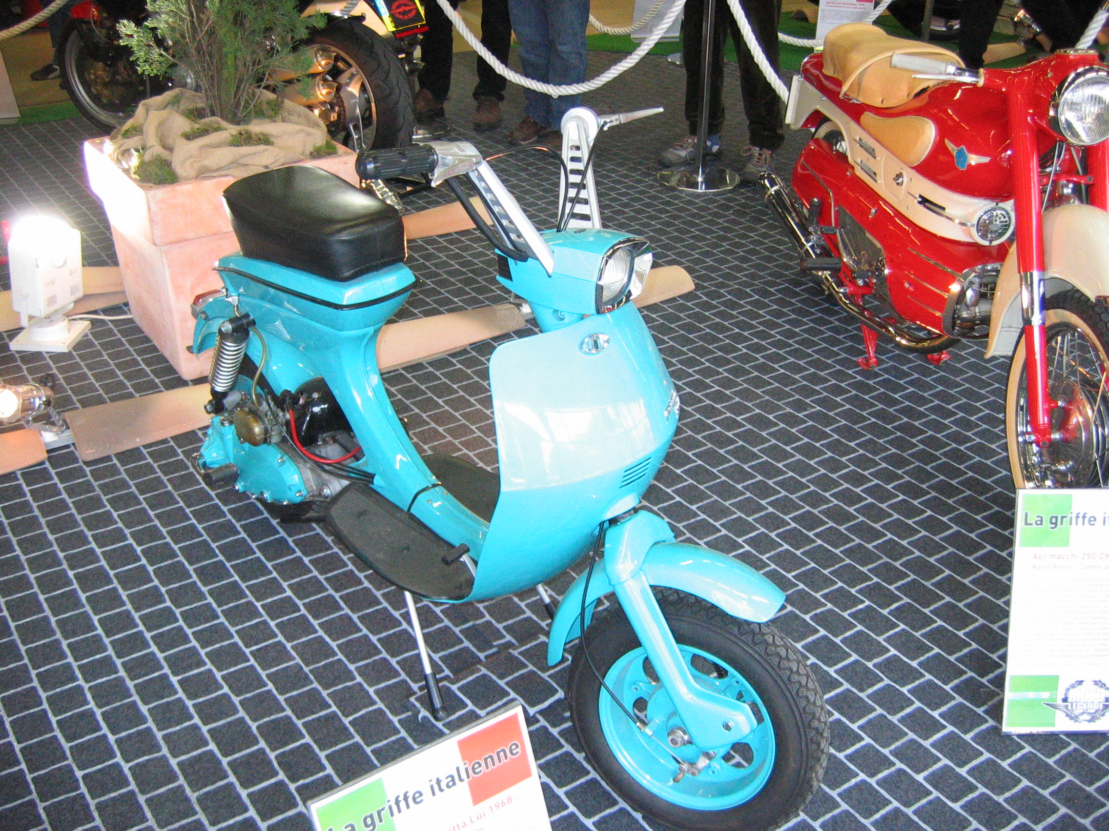 Italian Scooter Lambretta Lui, 1968 Picture : Gérard Delafond